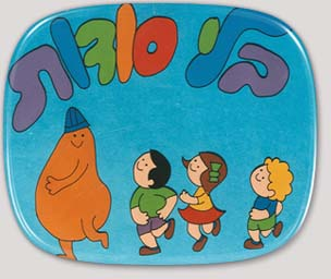 בלי סודות הייתה תוכנית טלוויזיה לימודית, אשר שודרה בטלוויזיה החינוכית הישראלית באמצע שנות השמונים, בהמשך בגלל הפופולריות הגדולה נוצרה תוכנית המשך, "בסוד העניינים", אשר הופקה בשנים 1991-1992.